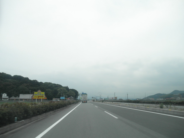 徳島県阿南市西路見町竹ノハナ 国道55号阿南道路